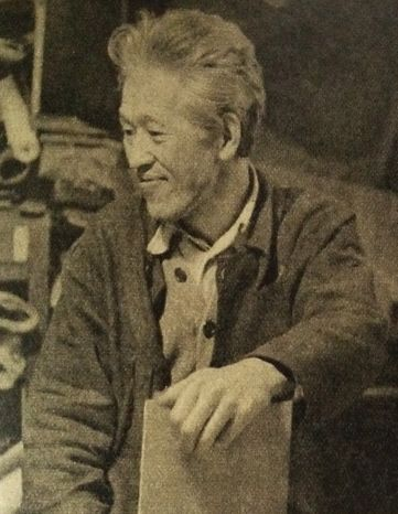 恩地孝四郎